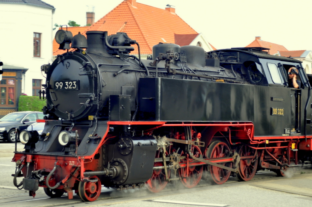 Der Molli: hier BR 99323 der Deutschen Reichsbahn